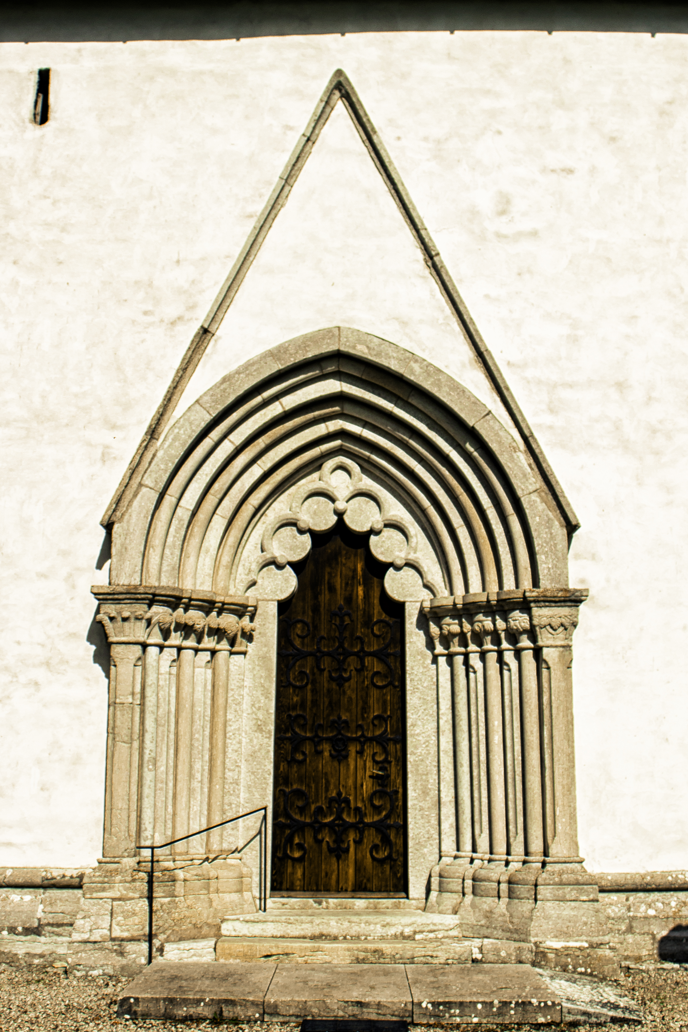 Portal sur da nave da igrexa de Atlingbo, na illa sueca de Gotland.